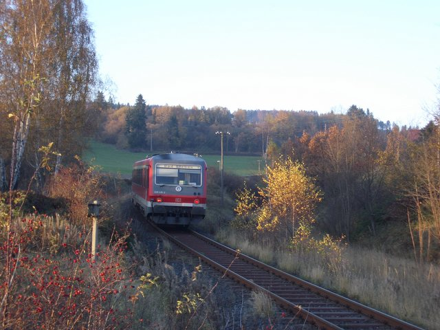 Im Oktober 2005 verläßt ein DB Nahverkehrstriebwagen Marxgrün in Richtung Bad Steben. Am rechten Bildrand ist die Trasse der Höllentalbahn zu erkennen.